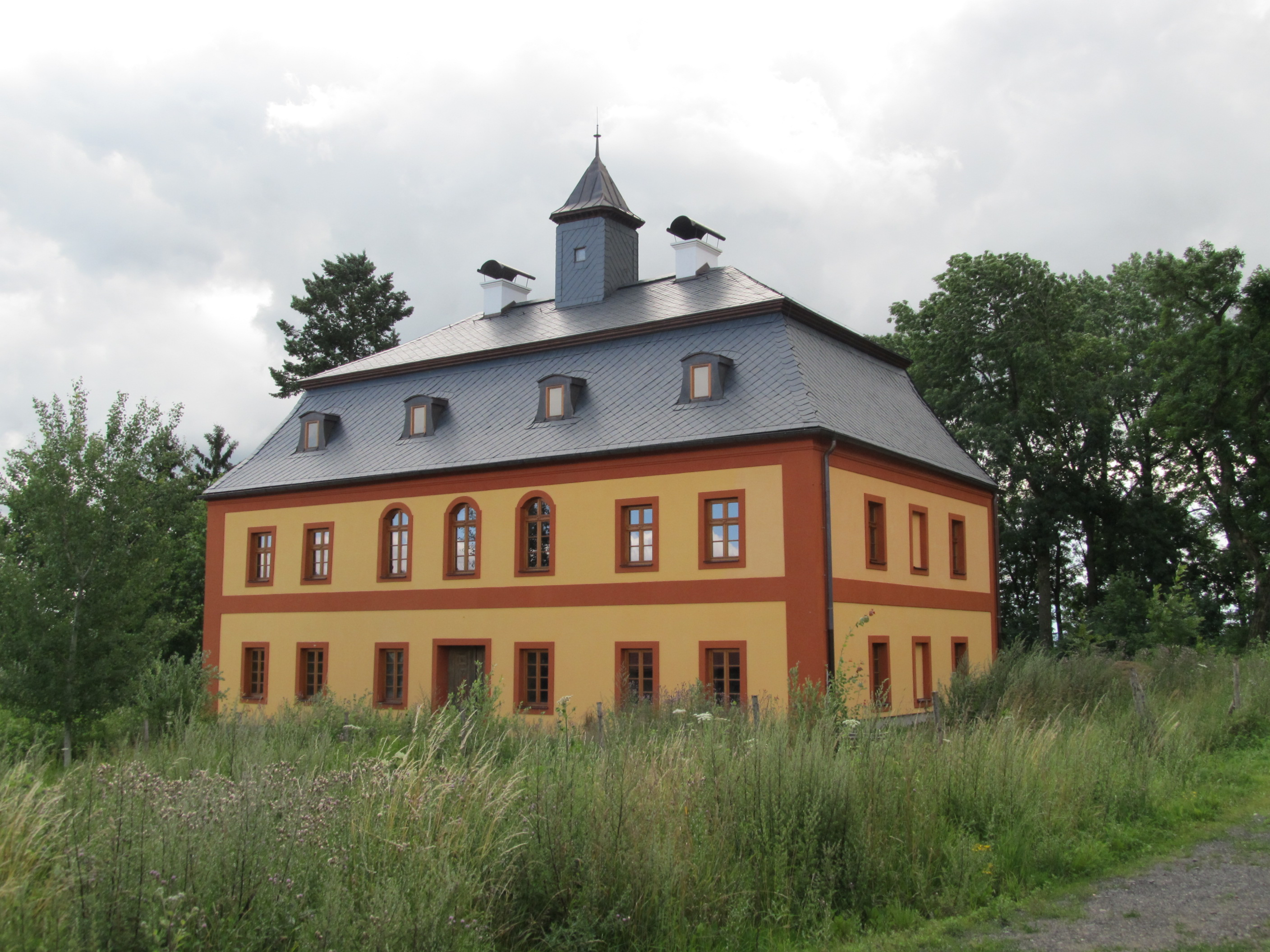 Tetětice - zámek